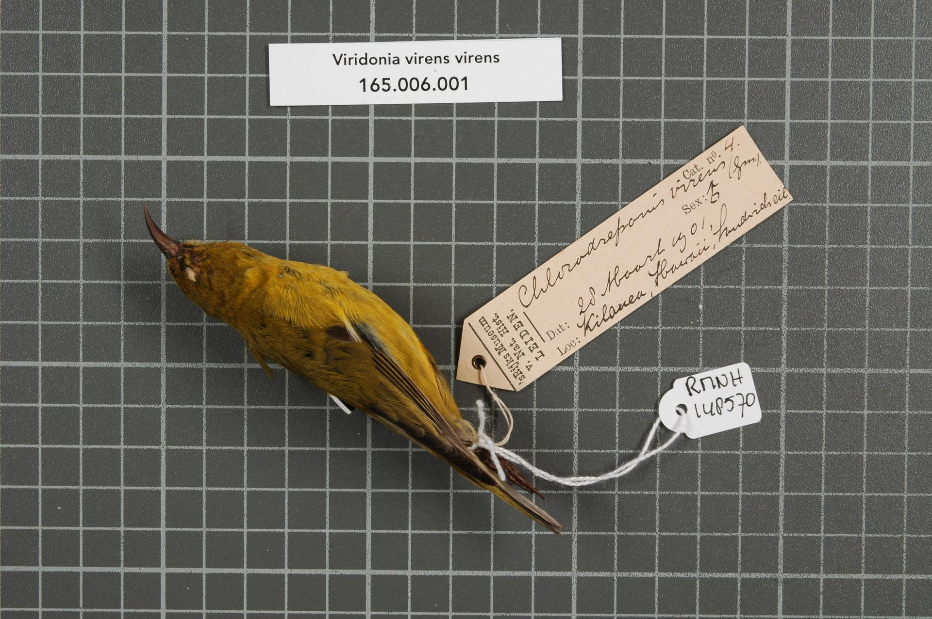 Viridonia virens virens (Gmelin, 1788)